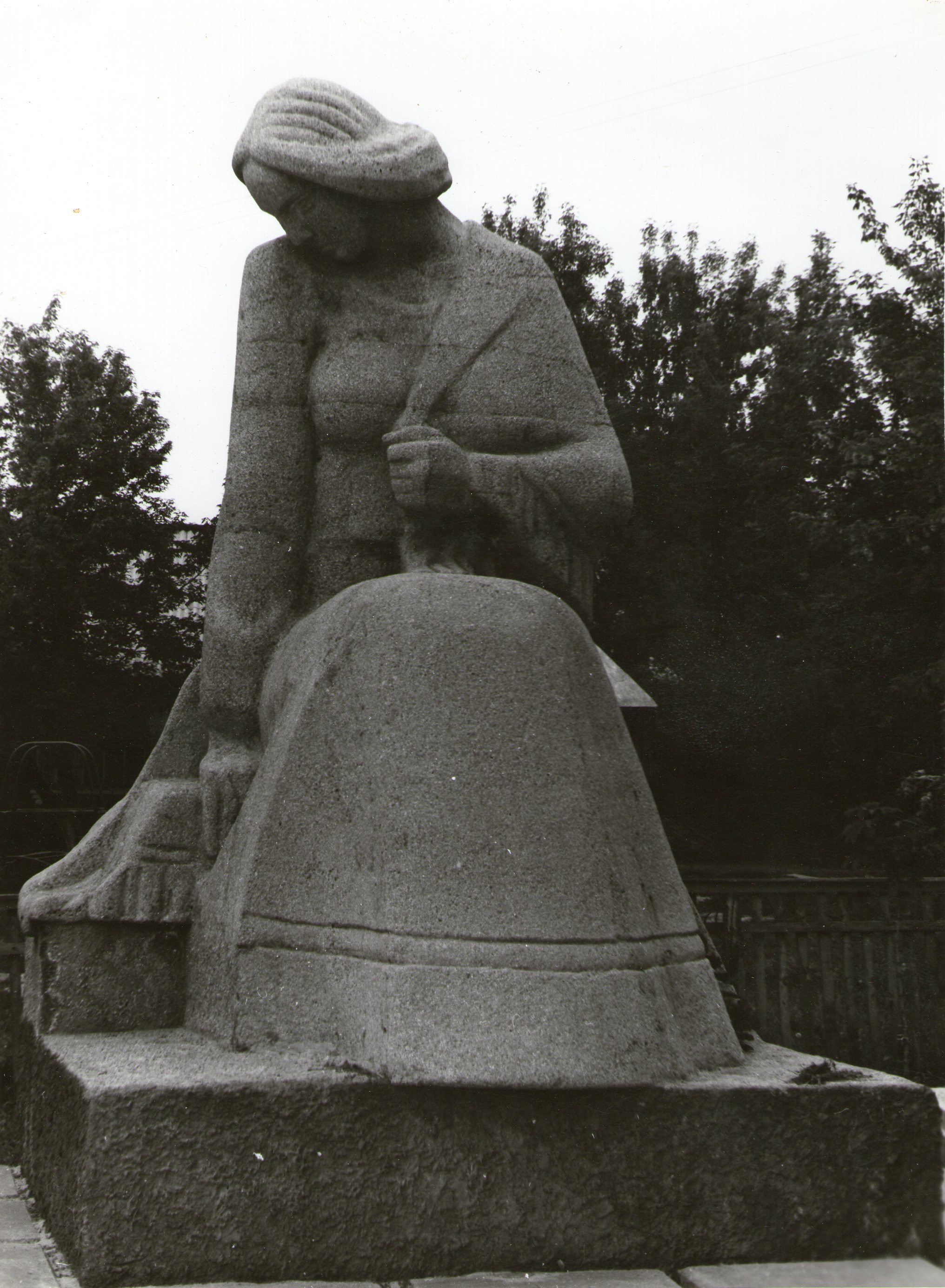 Скорбящая мать, Богородичное. скульптор Бринь Л. А.